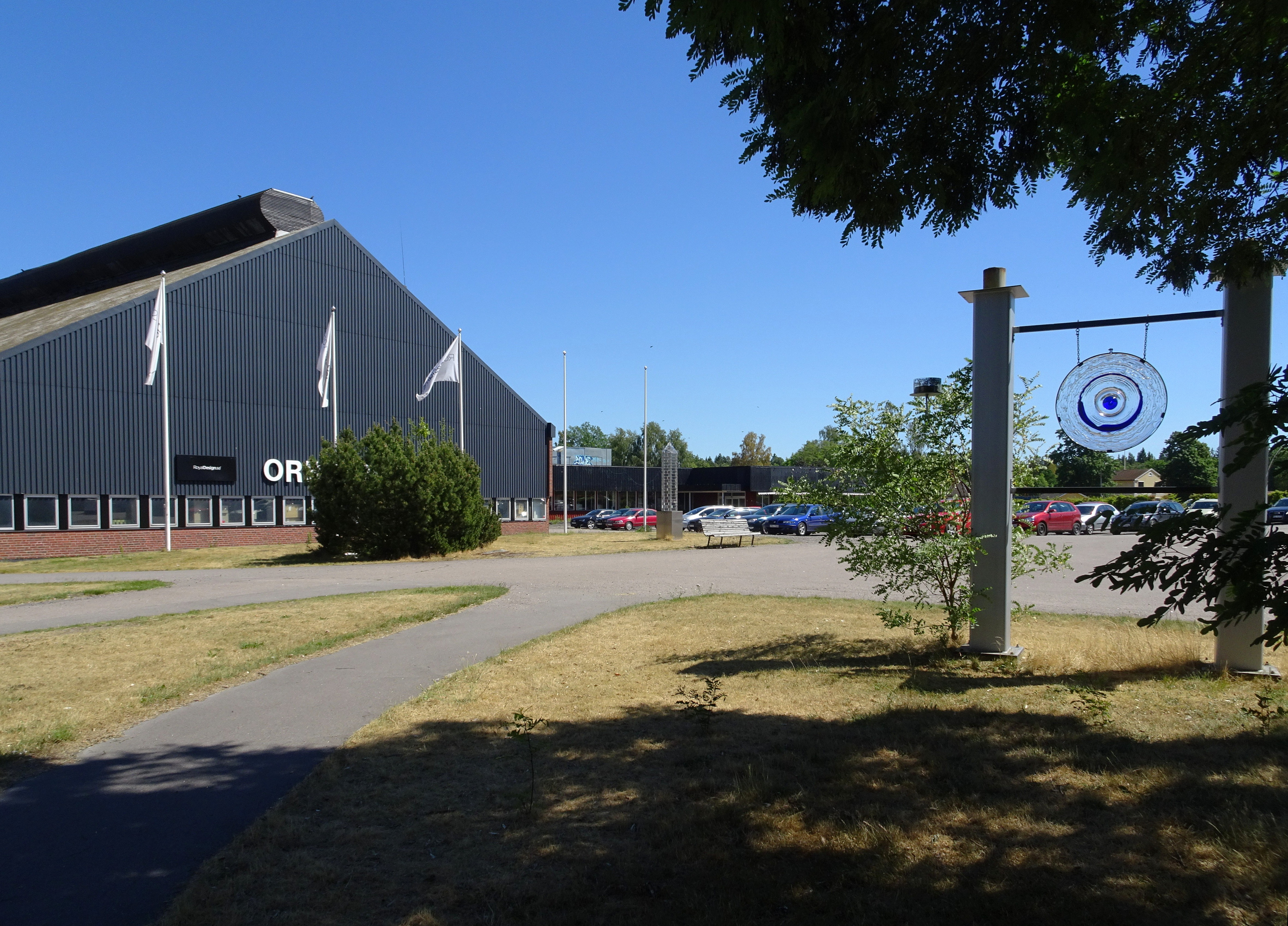 Orrefors glasbruks gamla byggnader